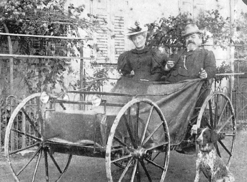 Foto - Andreas Flocken (1845 - 1913) mit Tochter Anna (1878 - ?) und Hund Hektor. Anna im Hochzeitskleid (Hochzeit: 15.05.1898)